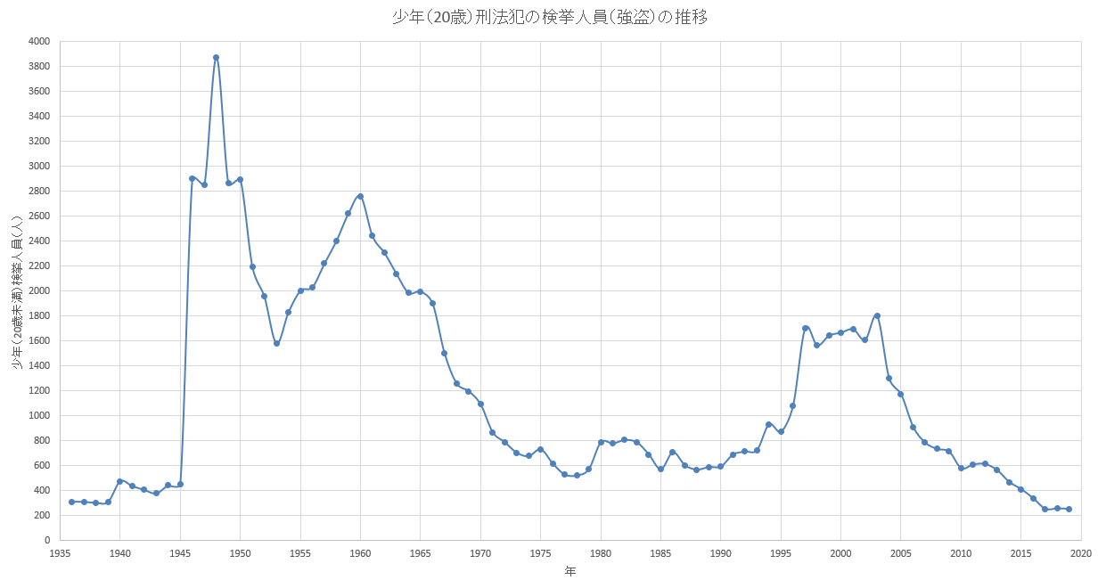 料3－3 少年による刑法犯 検挙人員（罪名別）の資料を基に1936年～2017年の強盗の検挙人員